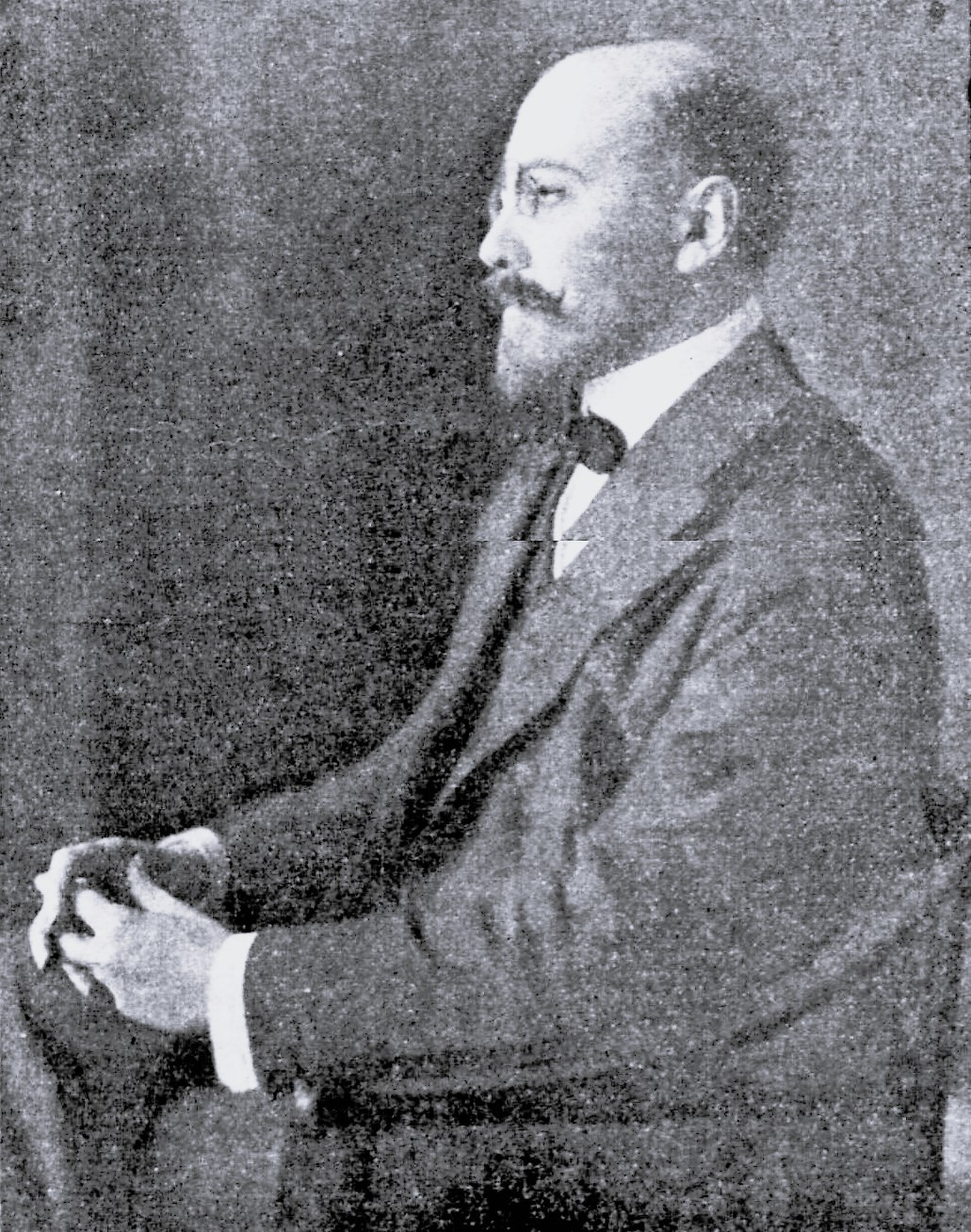 Dr. Neumark – Direktor des Hochofenwerks Lübeck